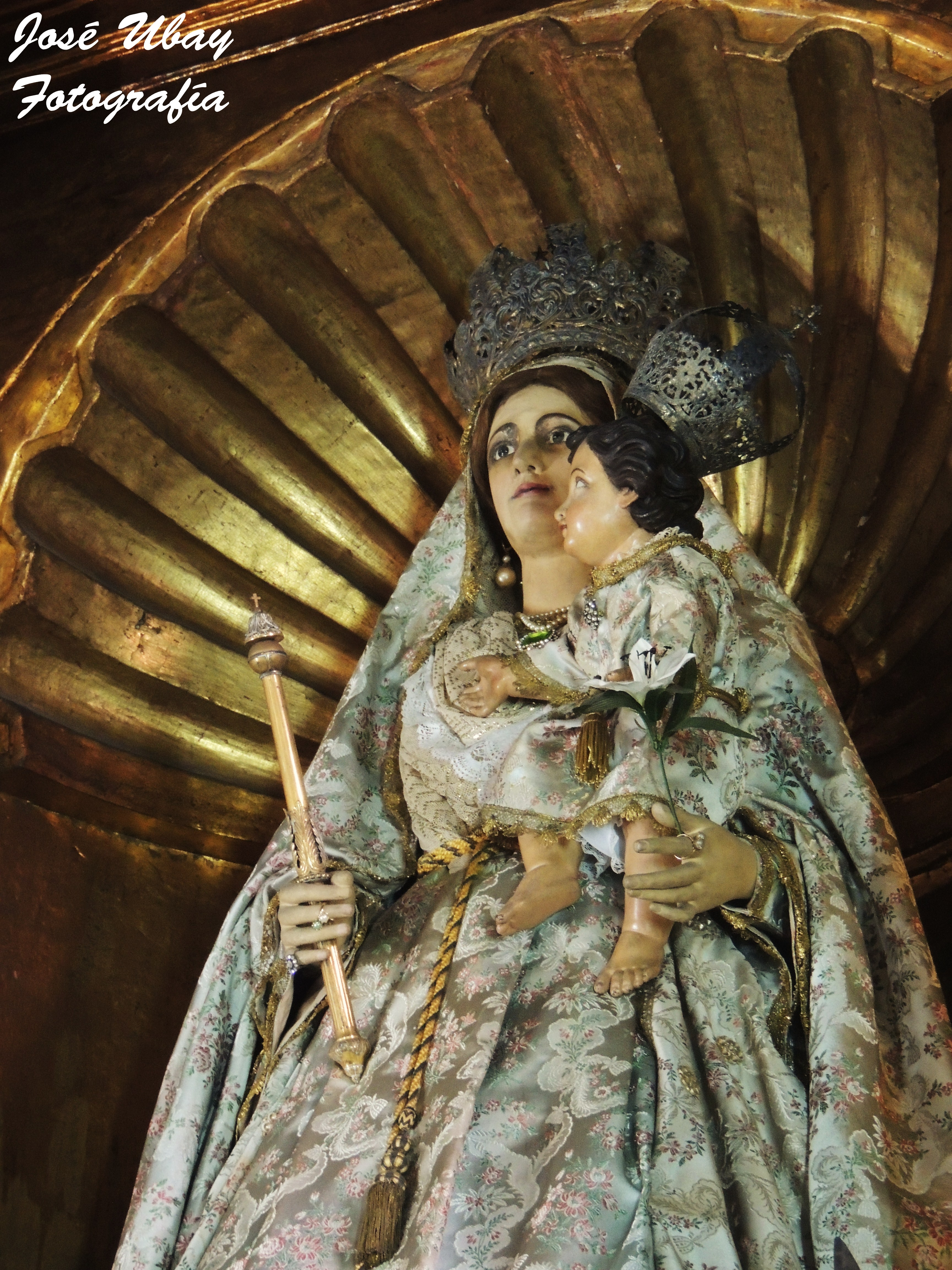 Nuestra Señora de los Reyes. Anónimo procedente de Madrid. 1894. Ermita de Nuestra Señora de los Reyes. Las Palmas de Gran Canaria.